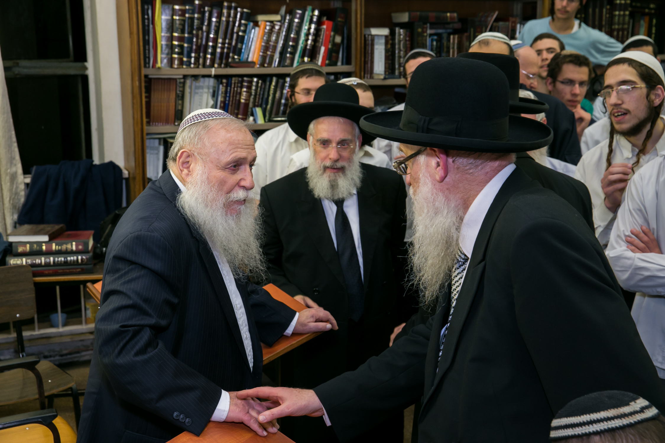 הרב יעקב שפירא הרב יהושע מגנס והרב חיים דרוקמן בישיבת מרכז הרב בהכנסת ספר תורה